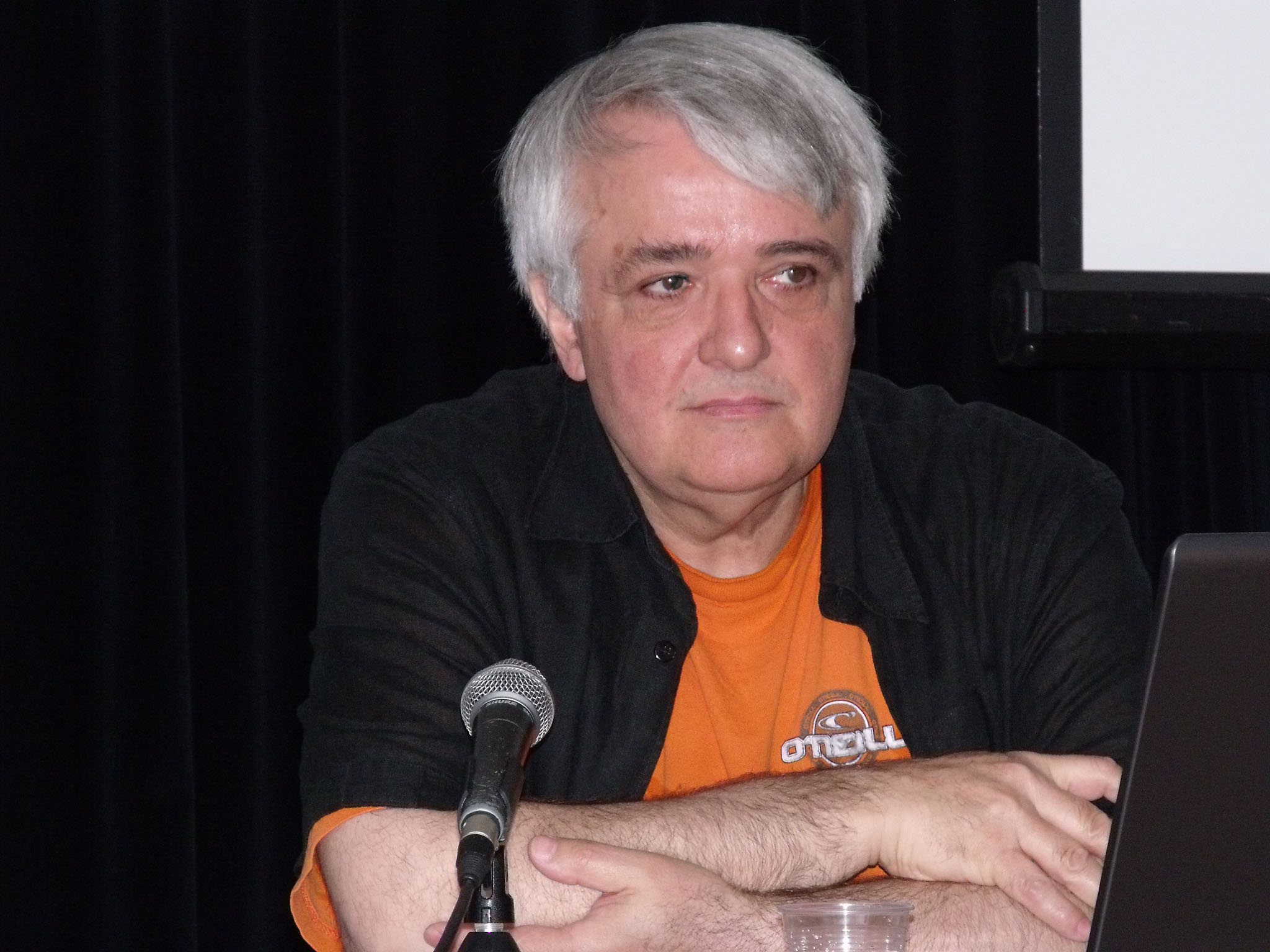 Voja Antonić